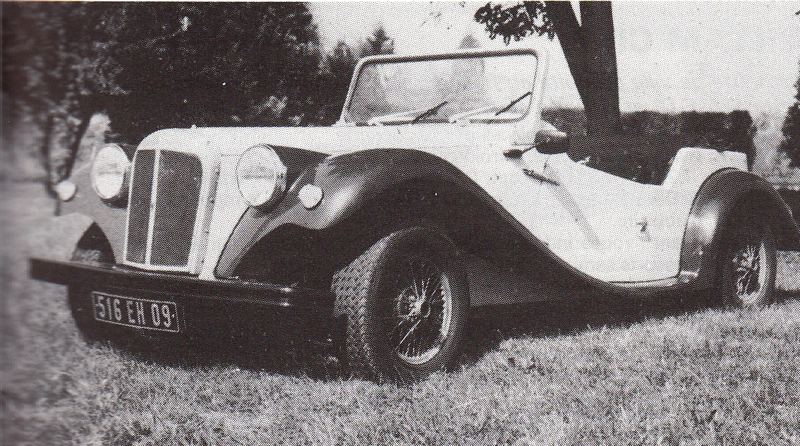 roadster JL